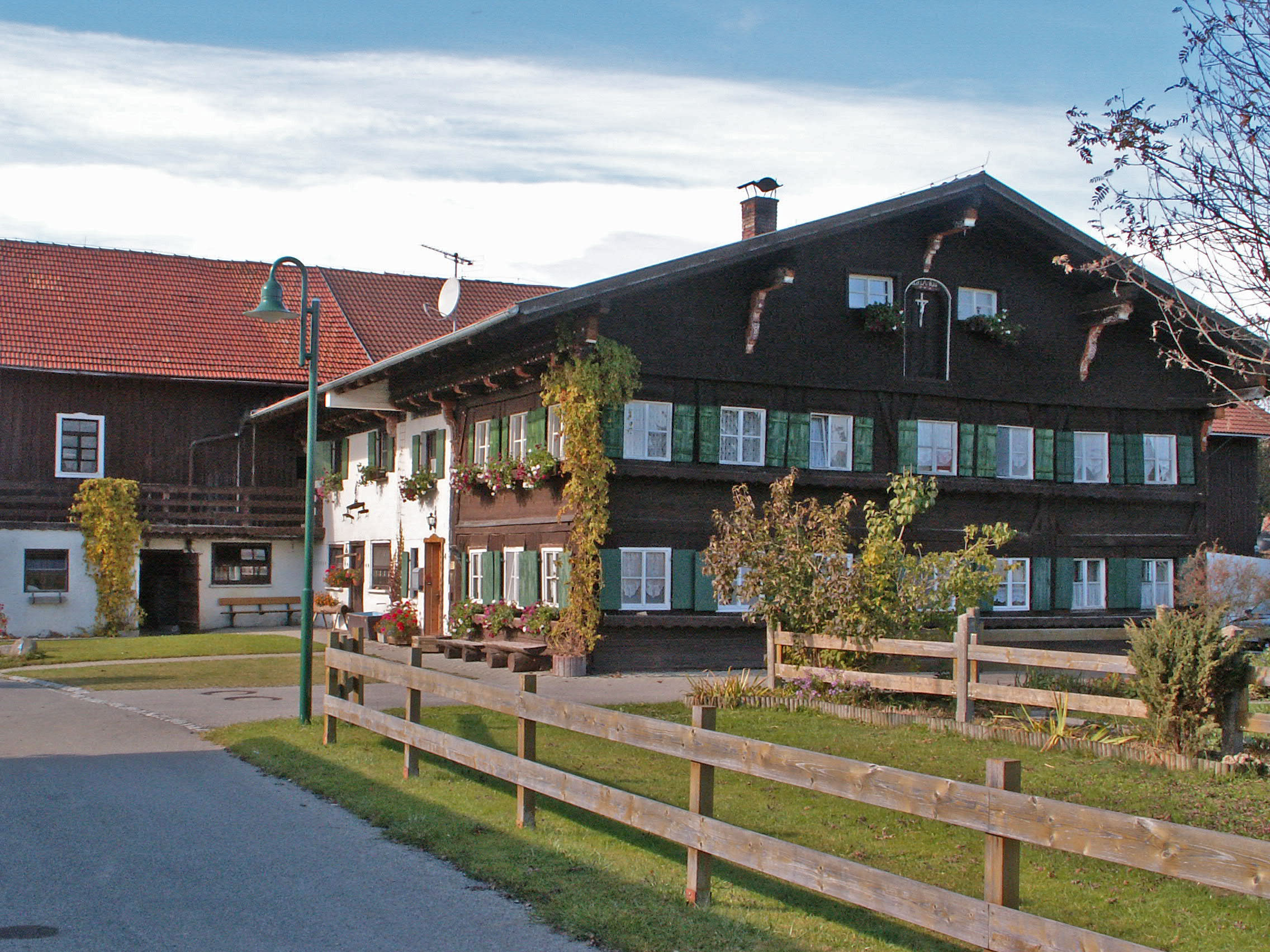 Staig 4, Görisried